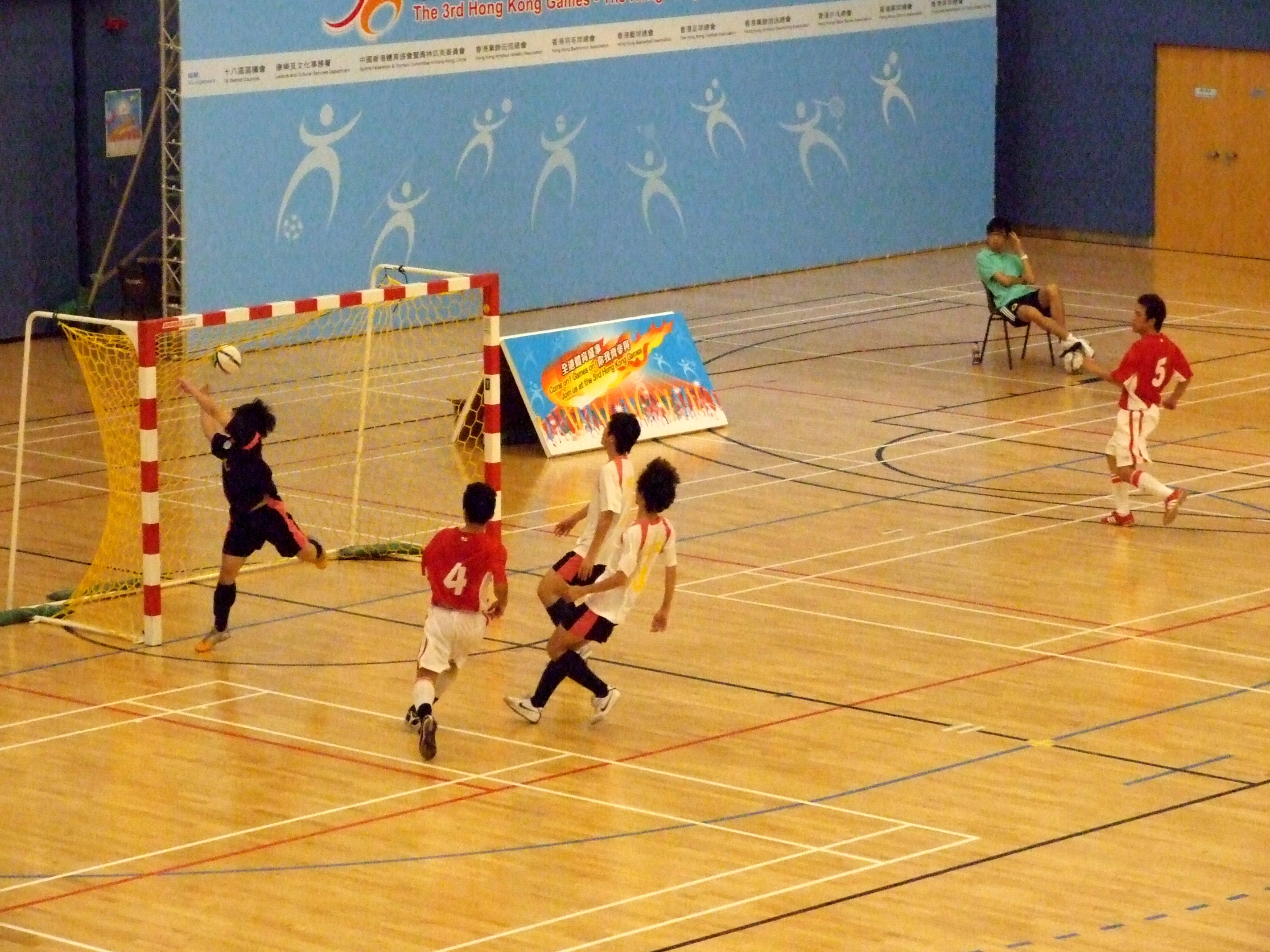 中文（香港）: 2011年全港運動會五人足球比賽第5、6名次賽官塘於完場前37秒一度扳平5-5